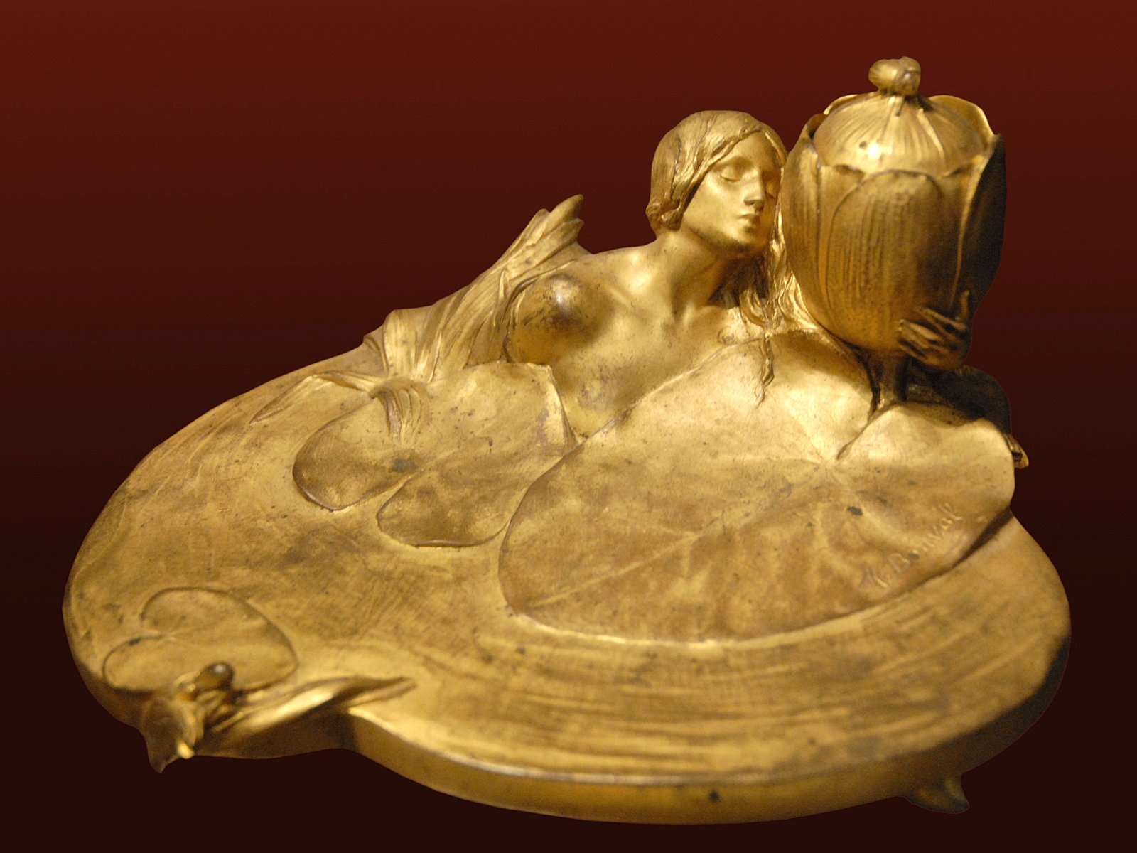 Encrier vers 1900 Maurice Bouval (1863-1916) Bronze doré Musée d'Orsay